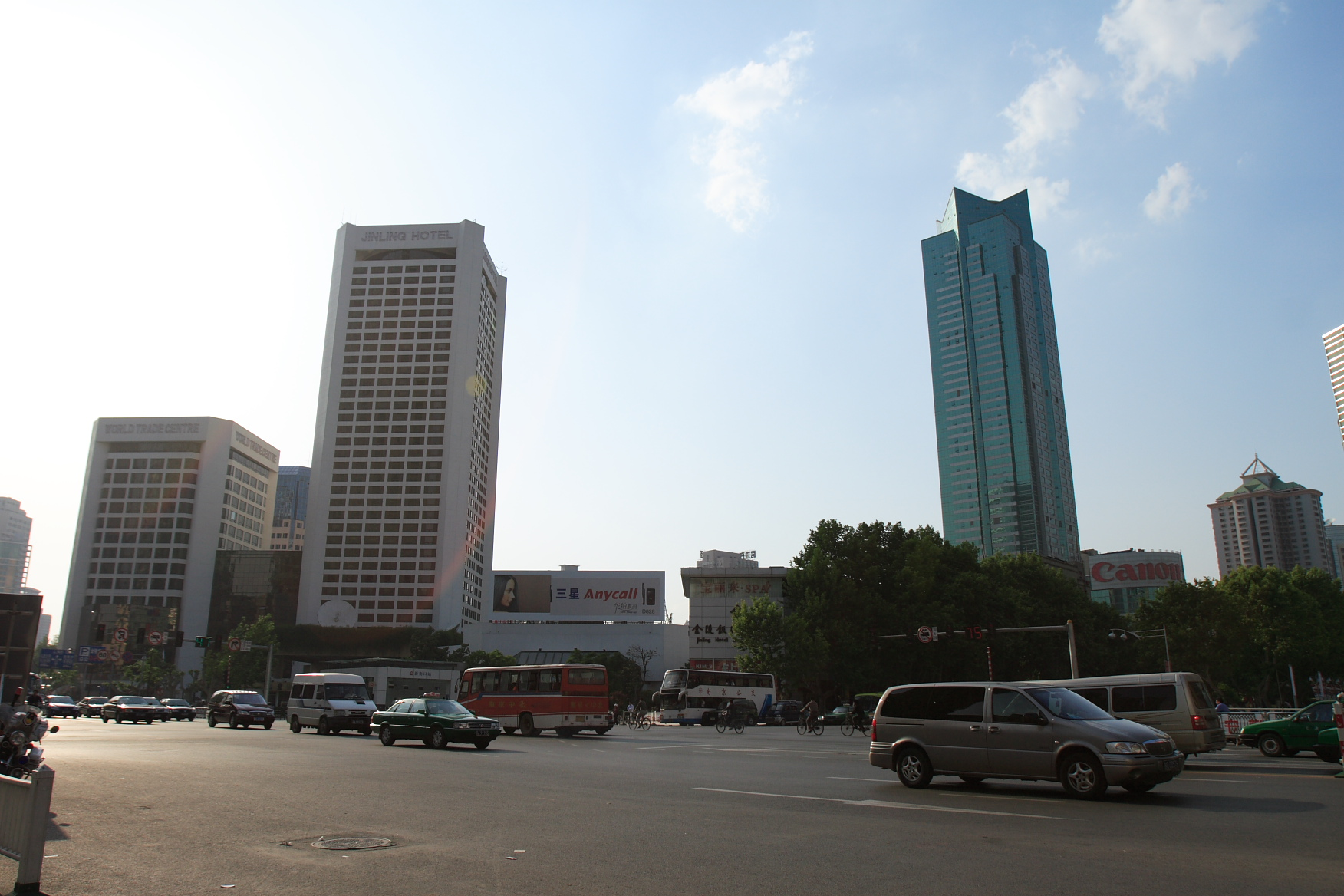 南京新街口